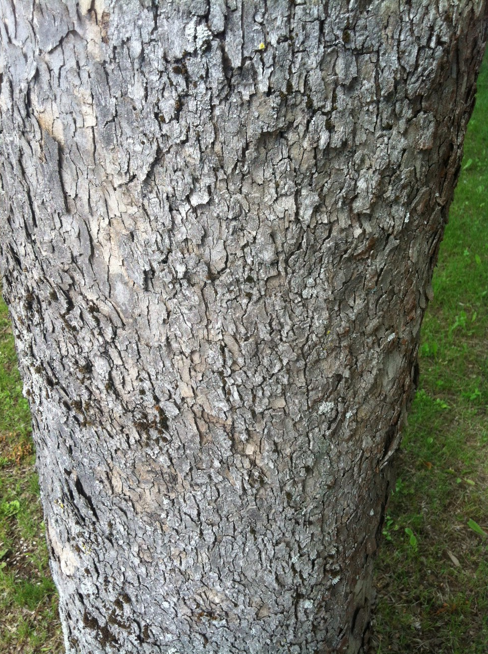 Lubje